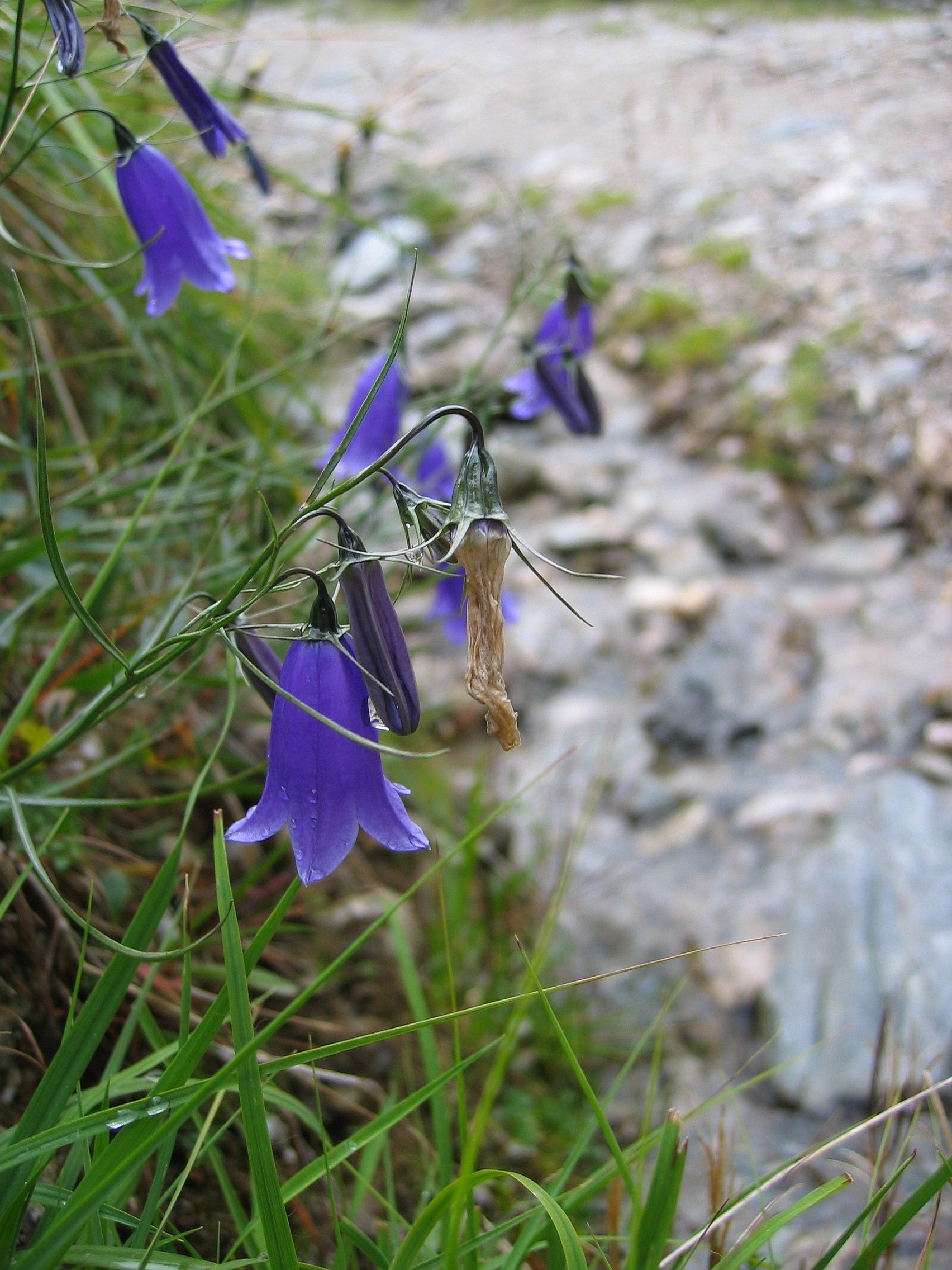 Campanula scheuchzeri Giglachsee, Styria, Austria